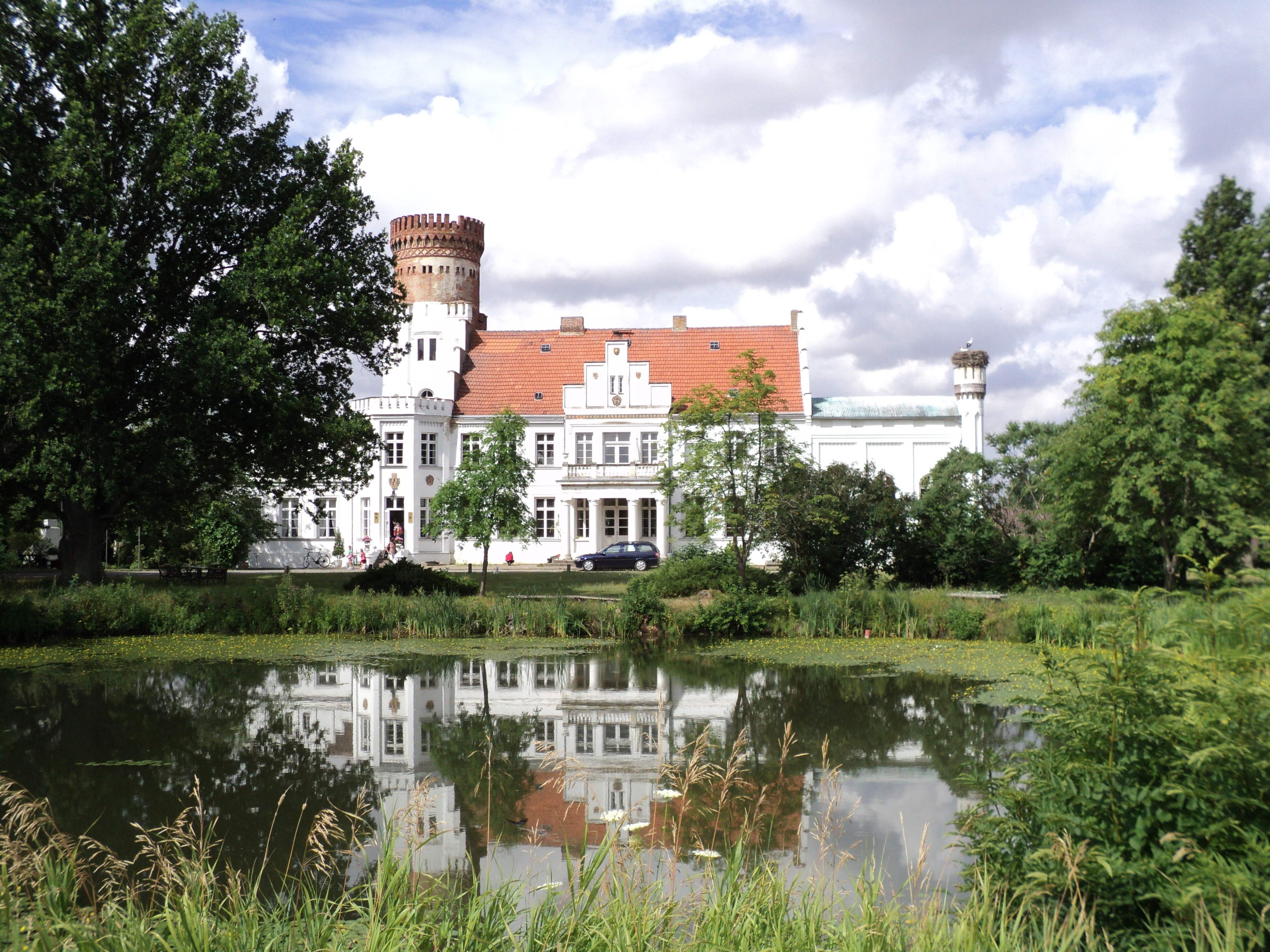 Das Schloss Wrodow im Sommer 2010